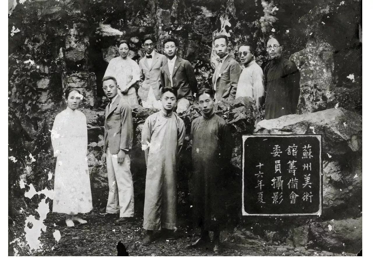 蘇州美術館籌備會